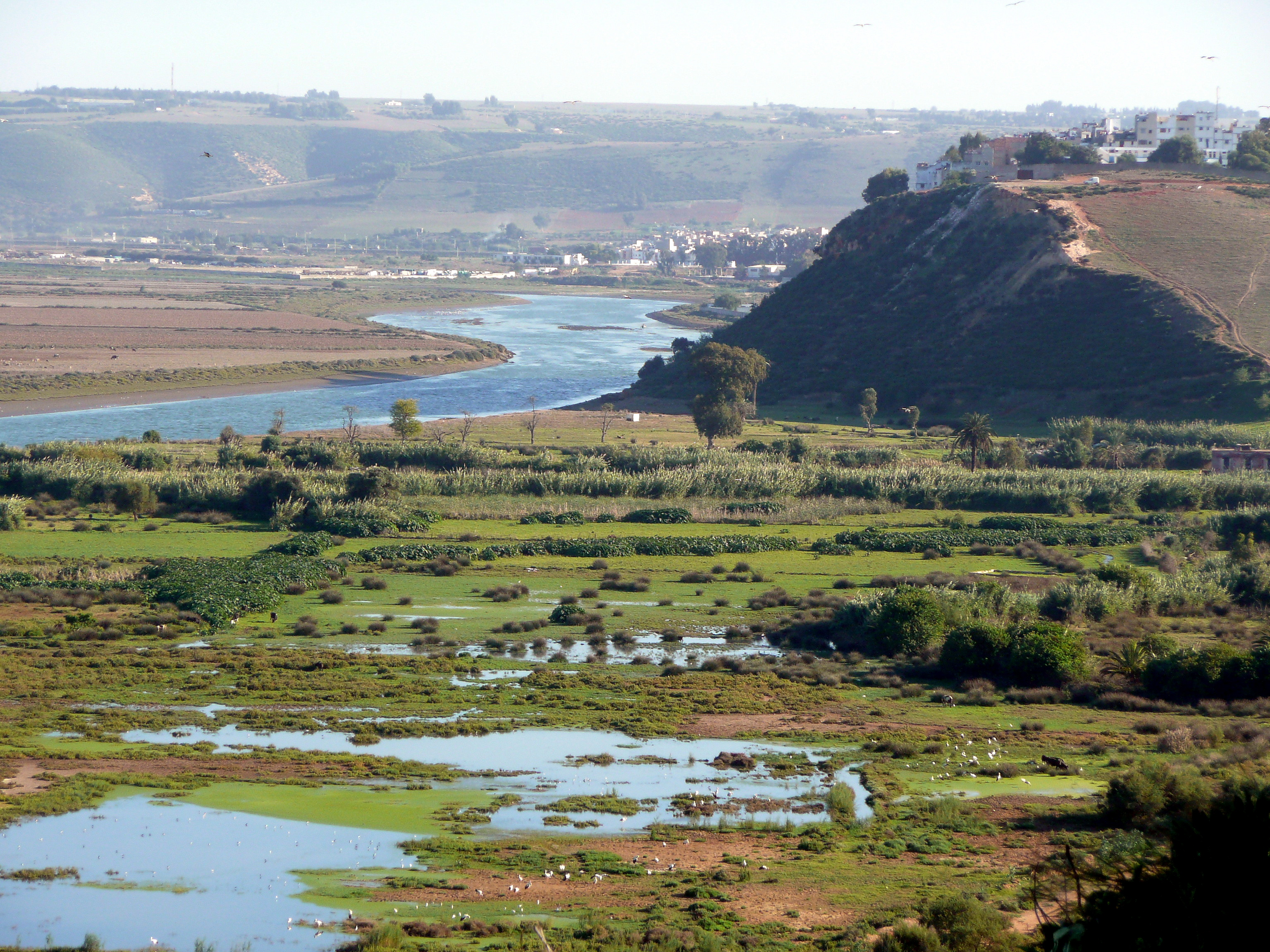 Vallée de l'oued Bou Regreg entre Rabat et Sale (Maroc)